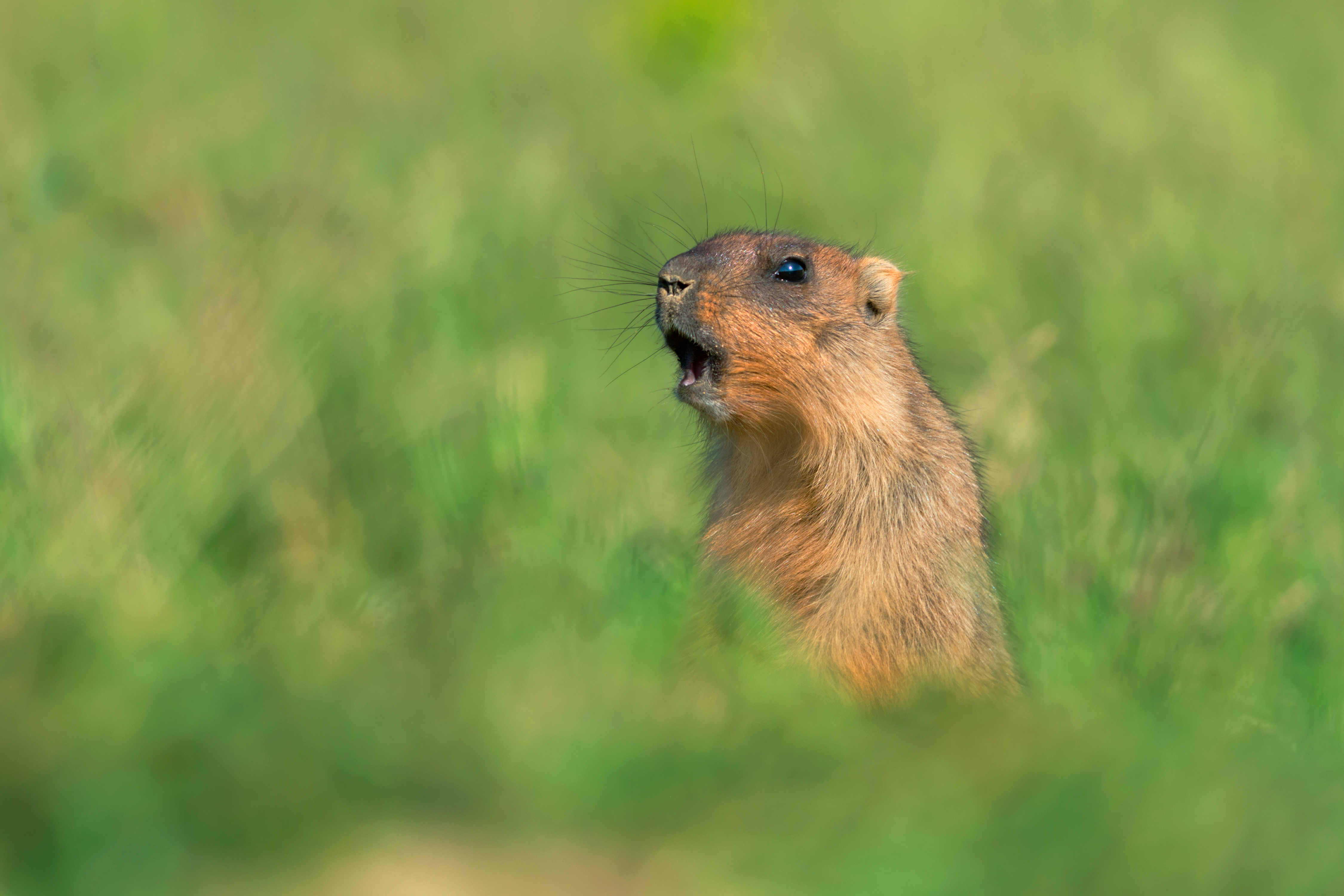 Байбак (Marmota bobak)